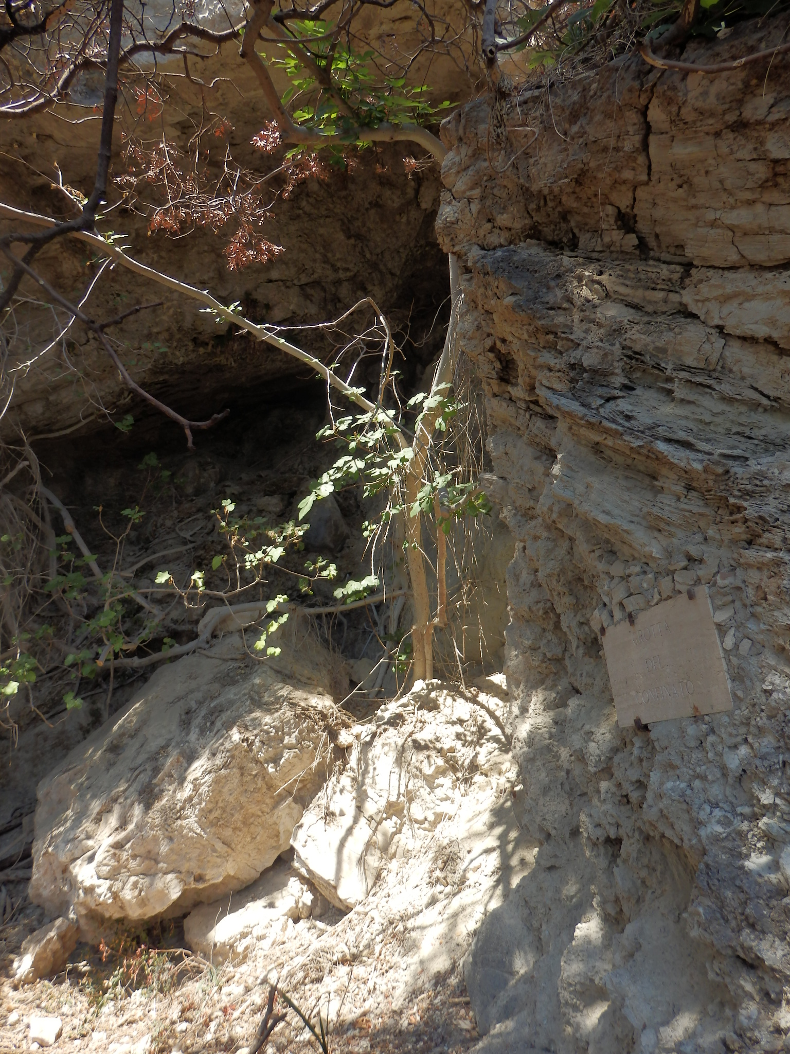 Grotte du Confinato dans la roche